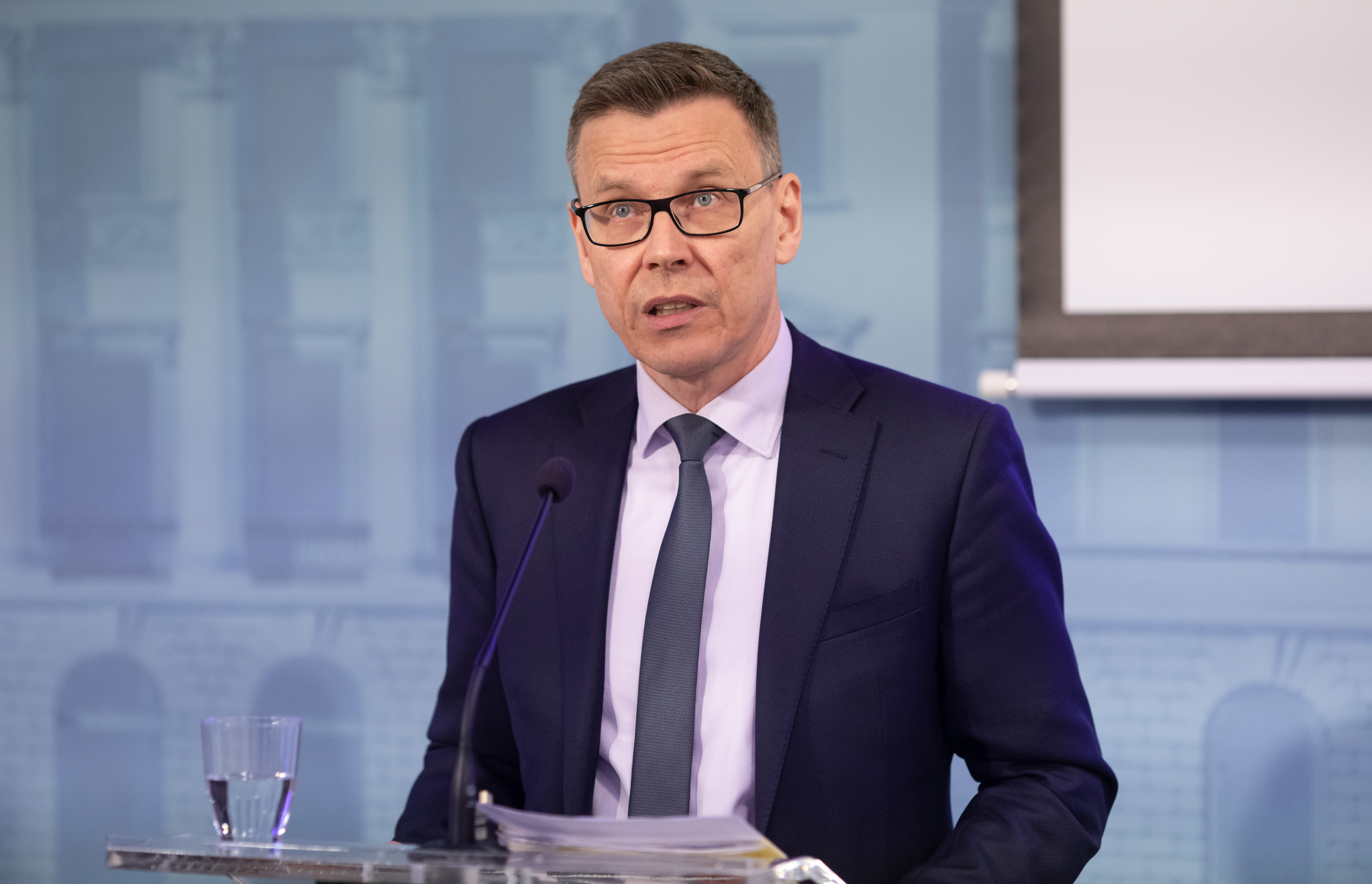 Valtioneuvoston taloudellinen katsaus 16.4.2020 / Ylijohtaja Mikko Spolander